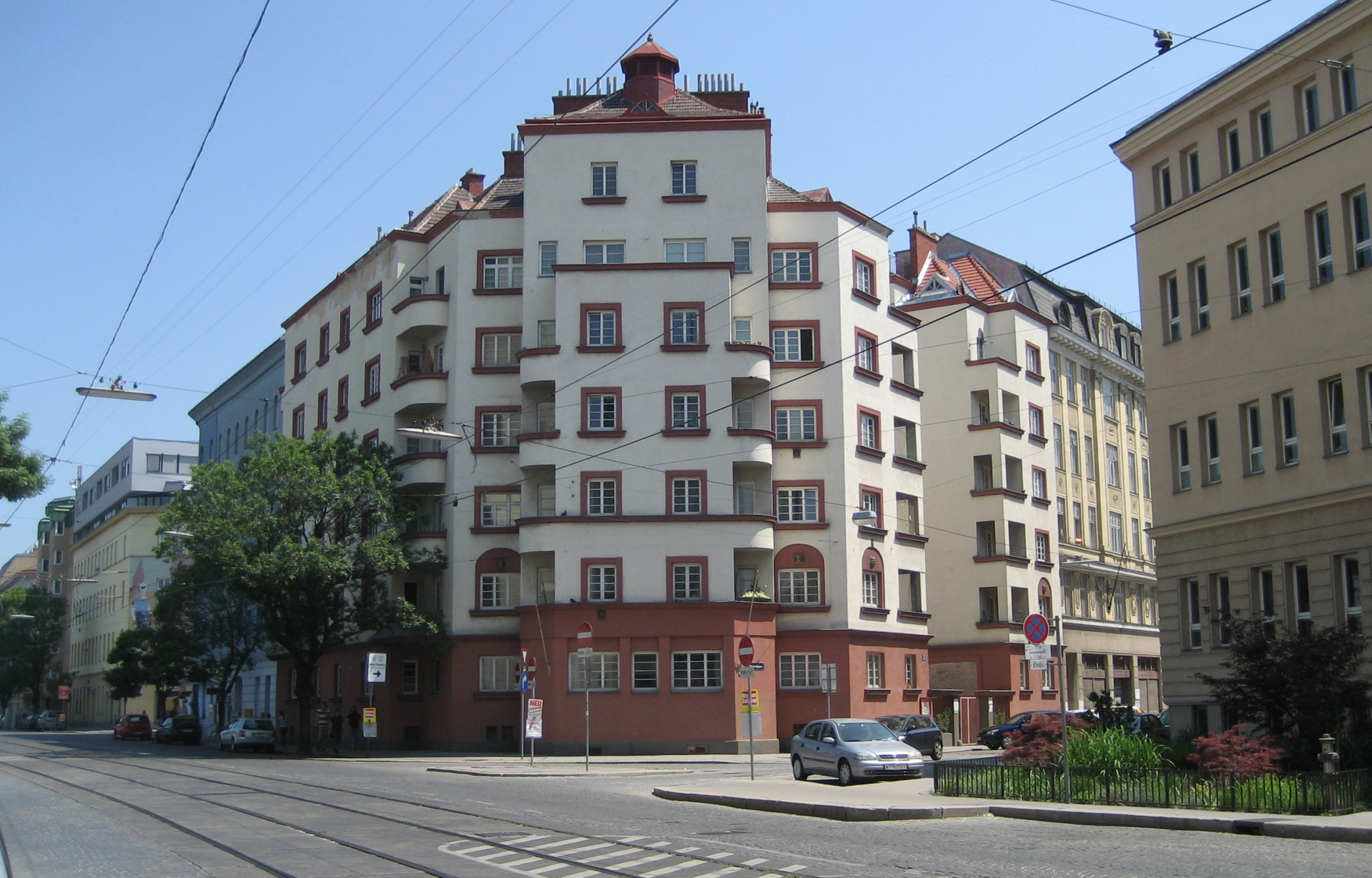 das Haus Marinelligasse 1 in der Leopoldstadt, in Wien This media shows the Vienna residential building (Gemeindebau) with the ID 354.